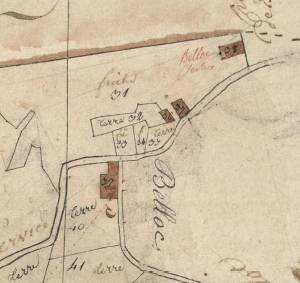 Bell-lloc en el Cadastre napoleònic del 1812 (Arxius Departamentals dels Pirineus Orientals)